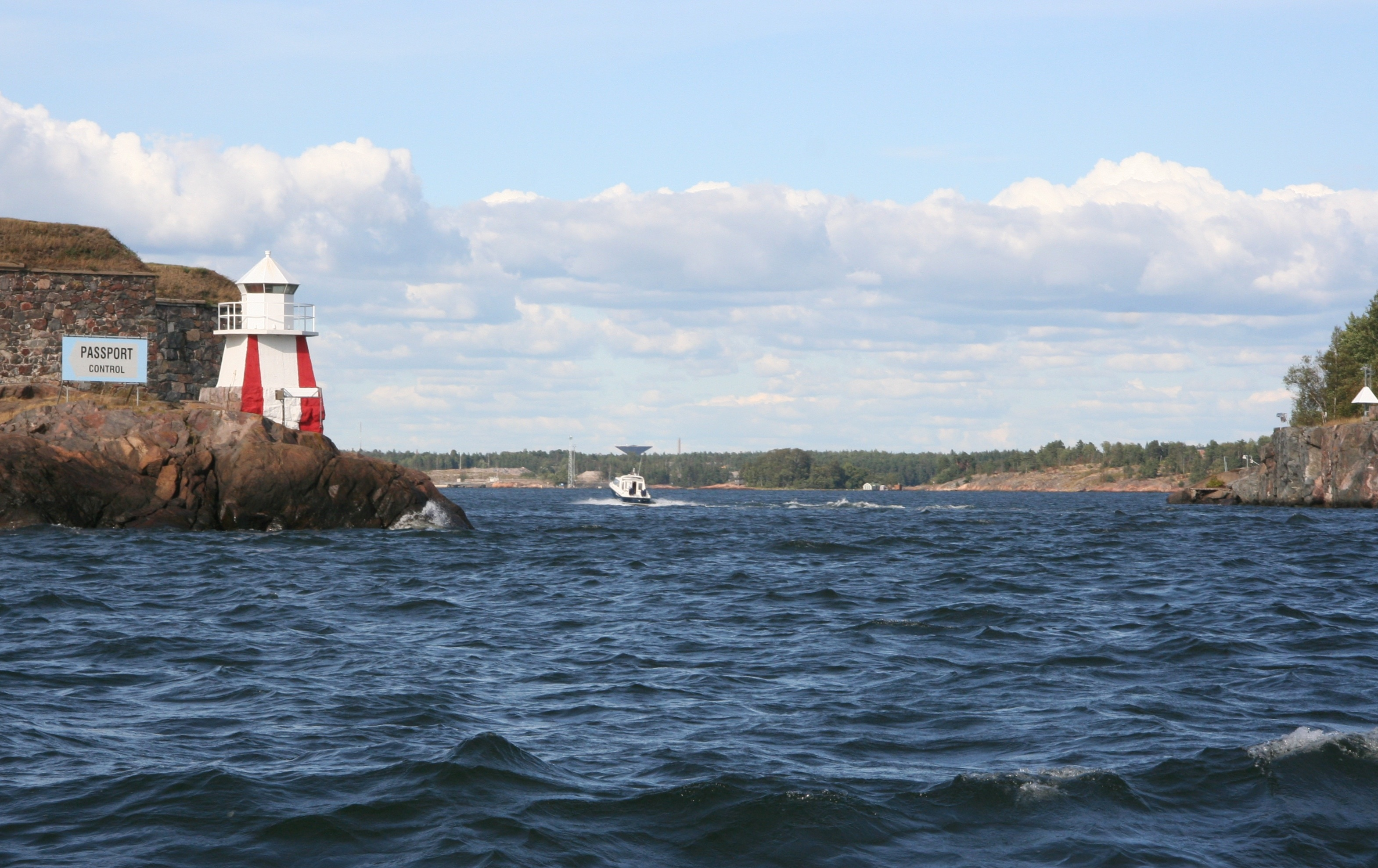 Näkymä Kruunuvuorenselälle Kustaanmiekasta. Oikealla Vallisaari, vasemmalla Suomenlinna.